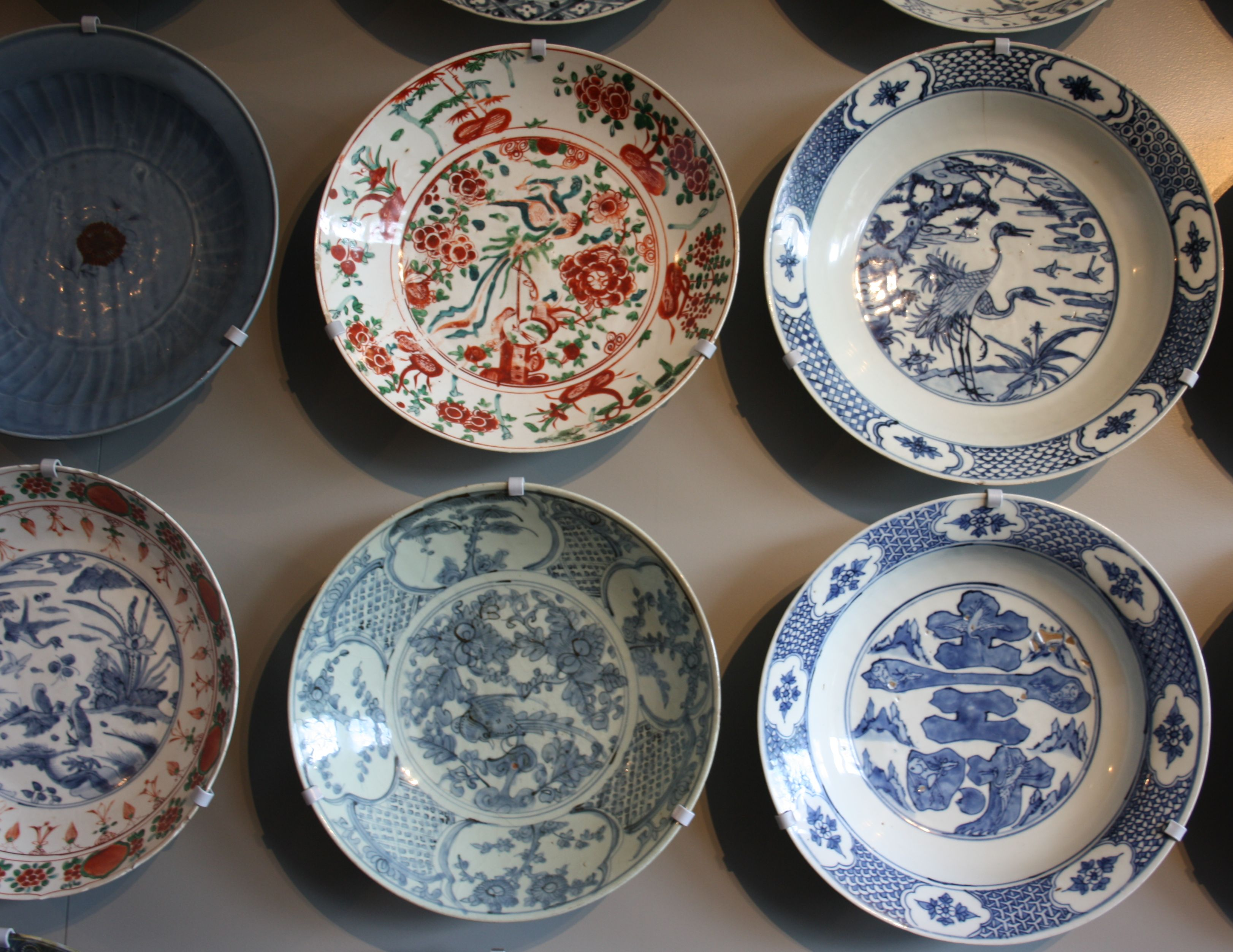 Zaal met Swatow-schalen en Martavanen Keramiekmuseum Princessehof